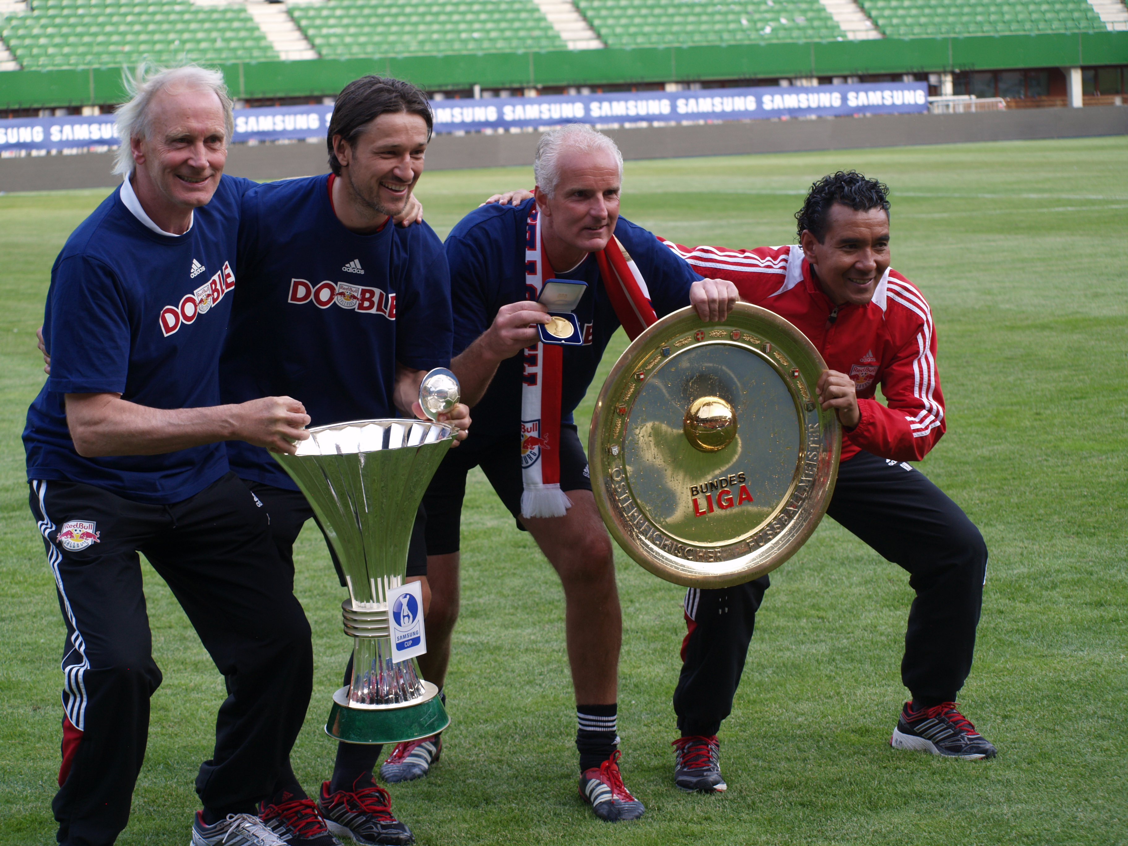 Trainerteam von RB Salzburg nach dem ÖFB-Cupfinale 2012 mit Pokal und Meisterschale